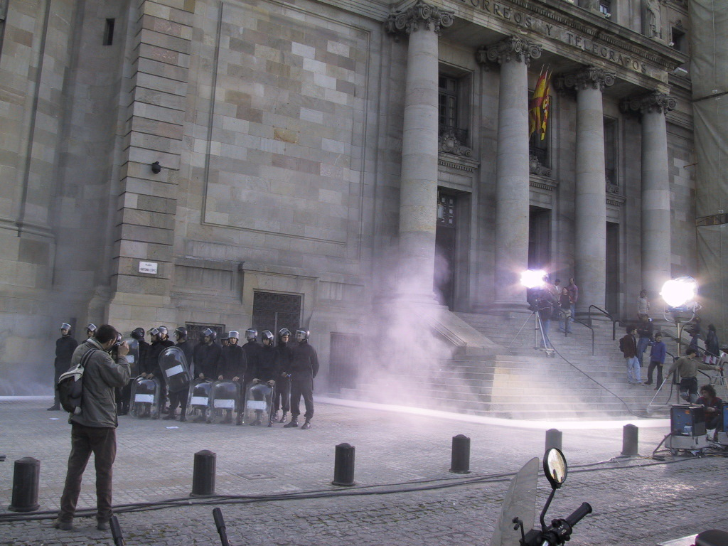 Edifici central de Correus i Telègrafs (Barcelona)